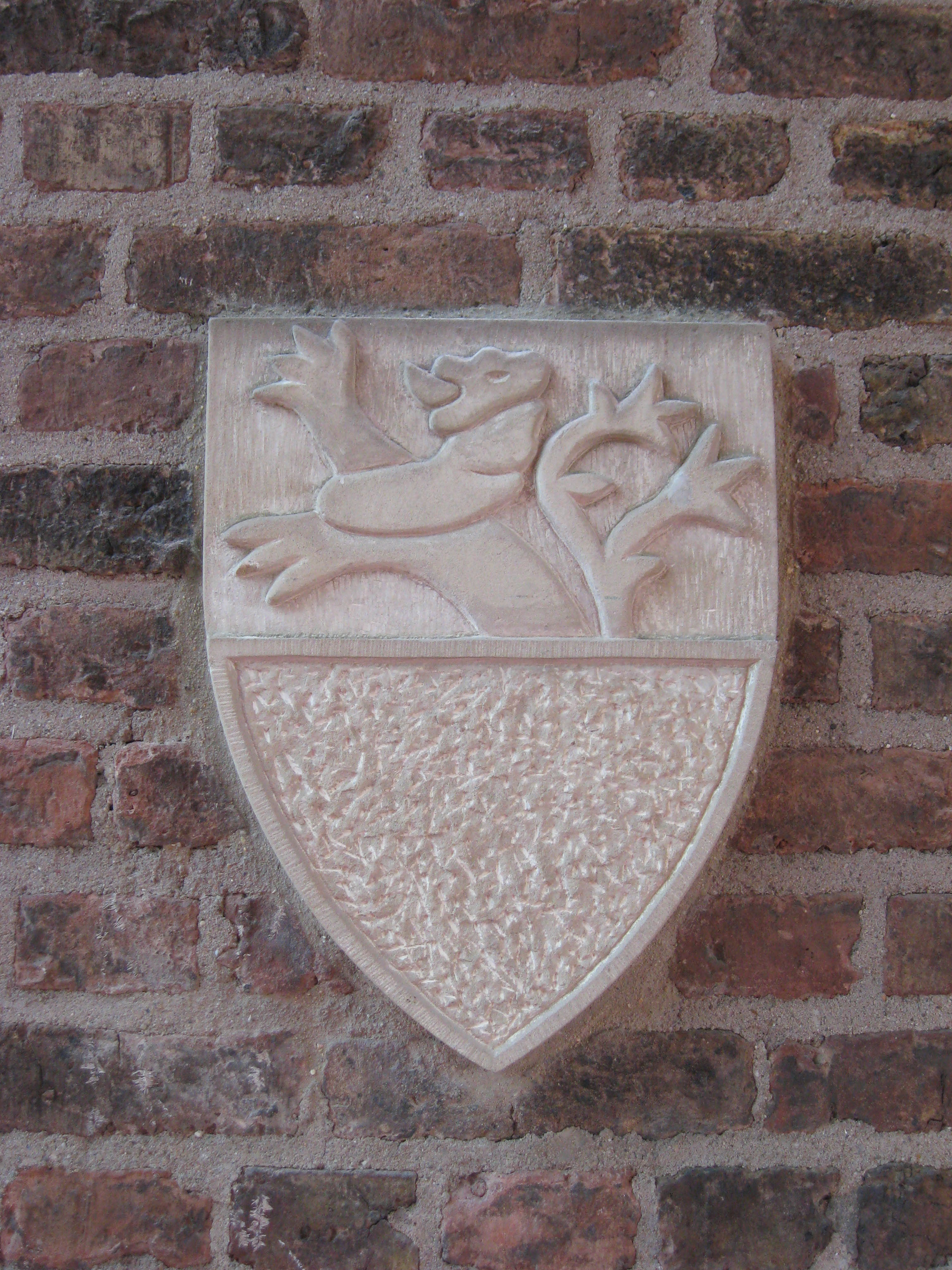 Historischer Eltzhof in Köln-Wahn (Wappen der Freiherren von Eltz-Rübenach) Datum: 16.01.2011 Urheber: B. Neulich alias Benutzer:Neulich im Roxy Kino Quelle: Privates Fotoarchiv des Urhebers